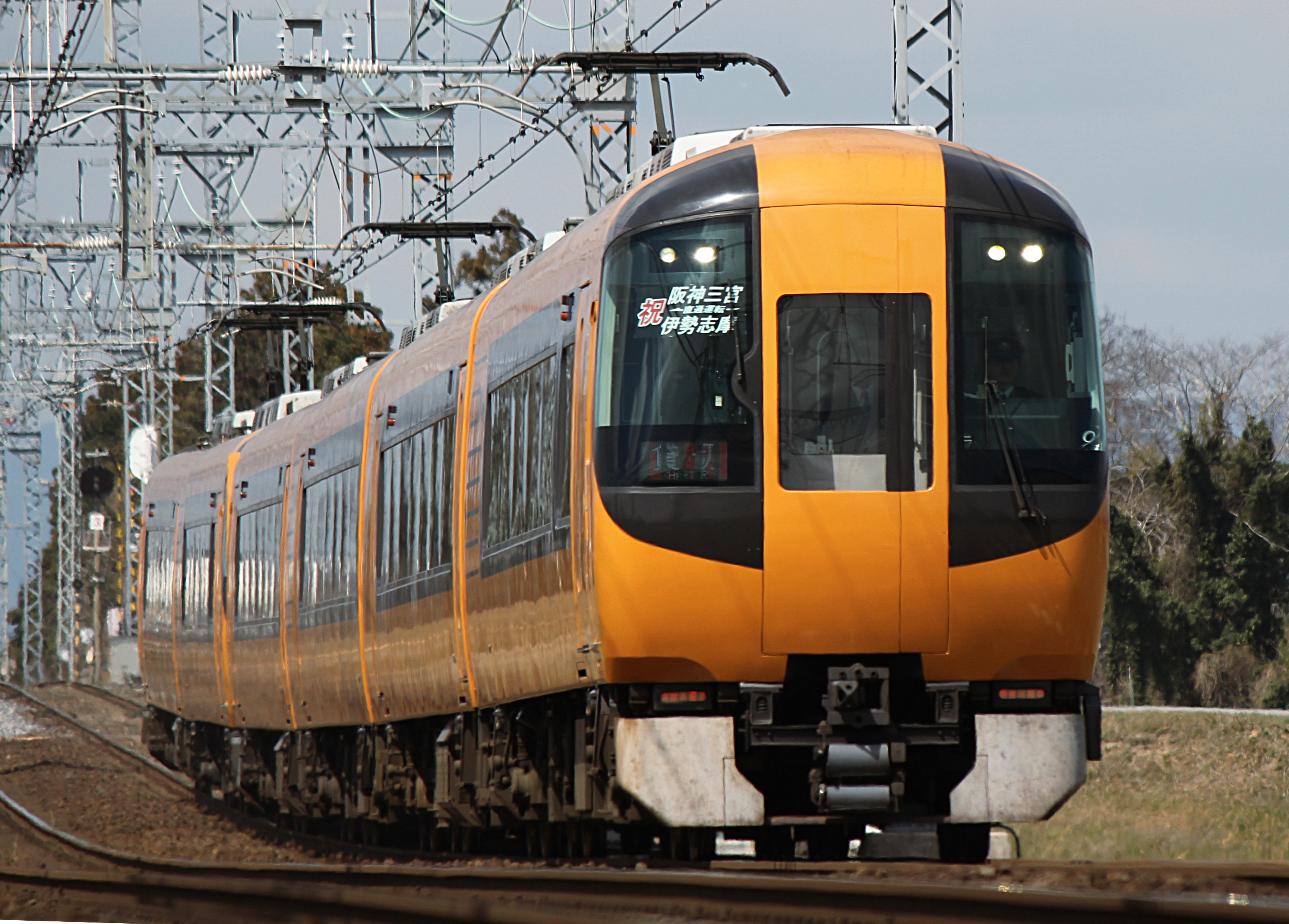 阪神三宮-賢島間直通特急の初列車 2014年3月22日